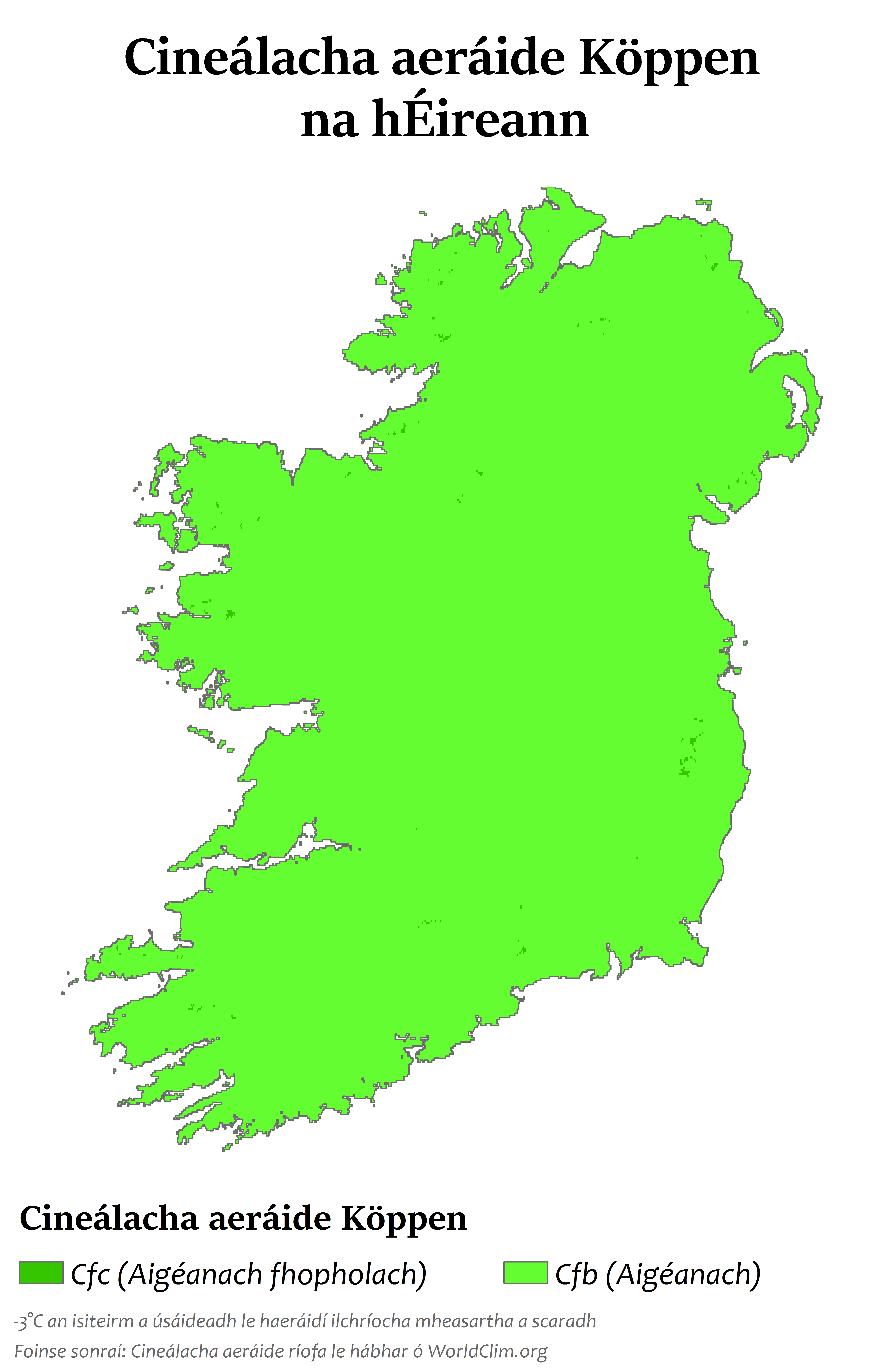 Cineálacha aeráide na hÉireann de réir Köppen